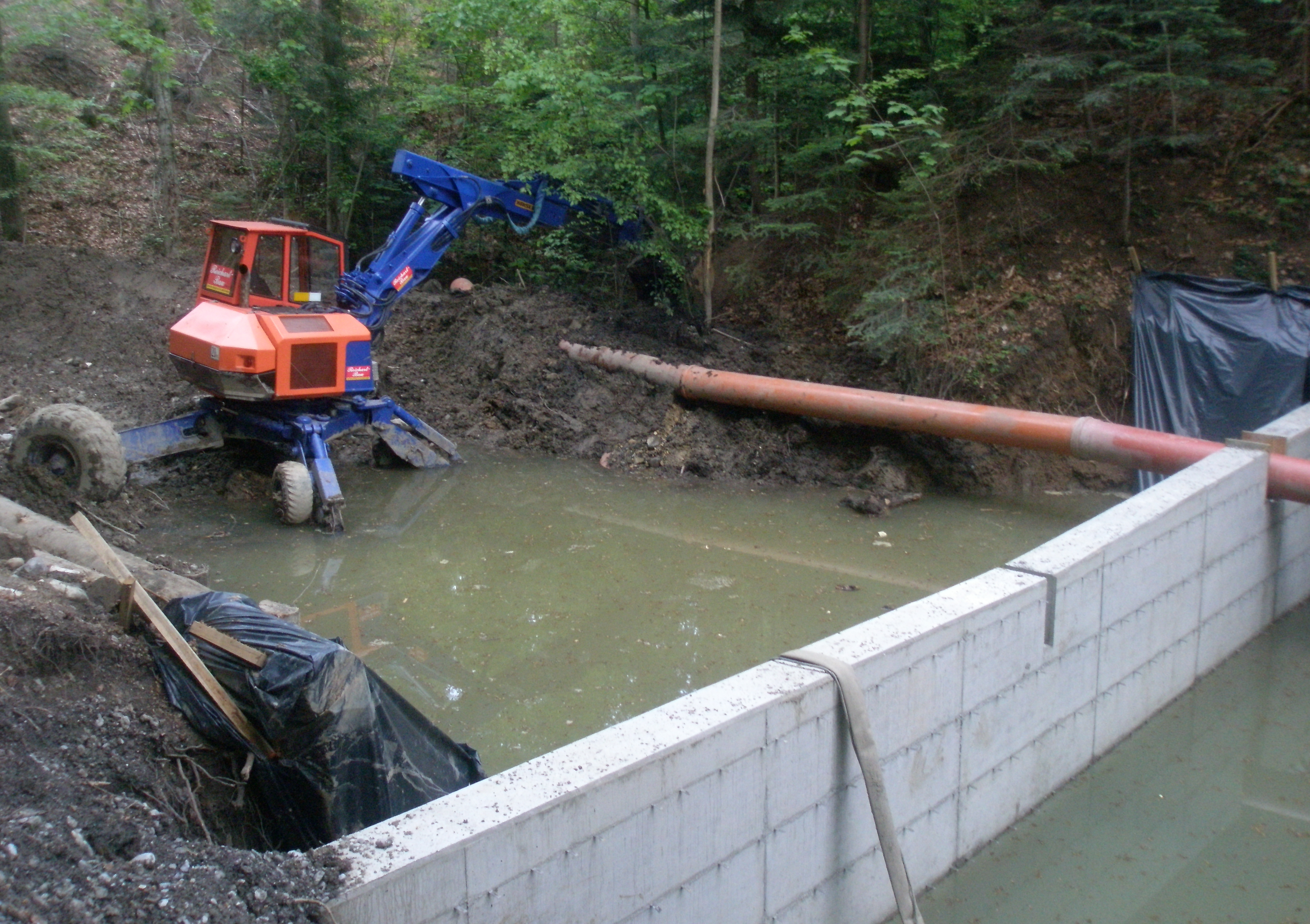 Ein Teich in Heilgereuthe